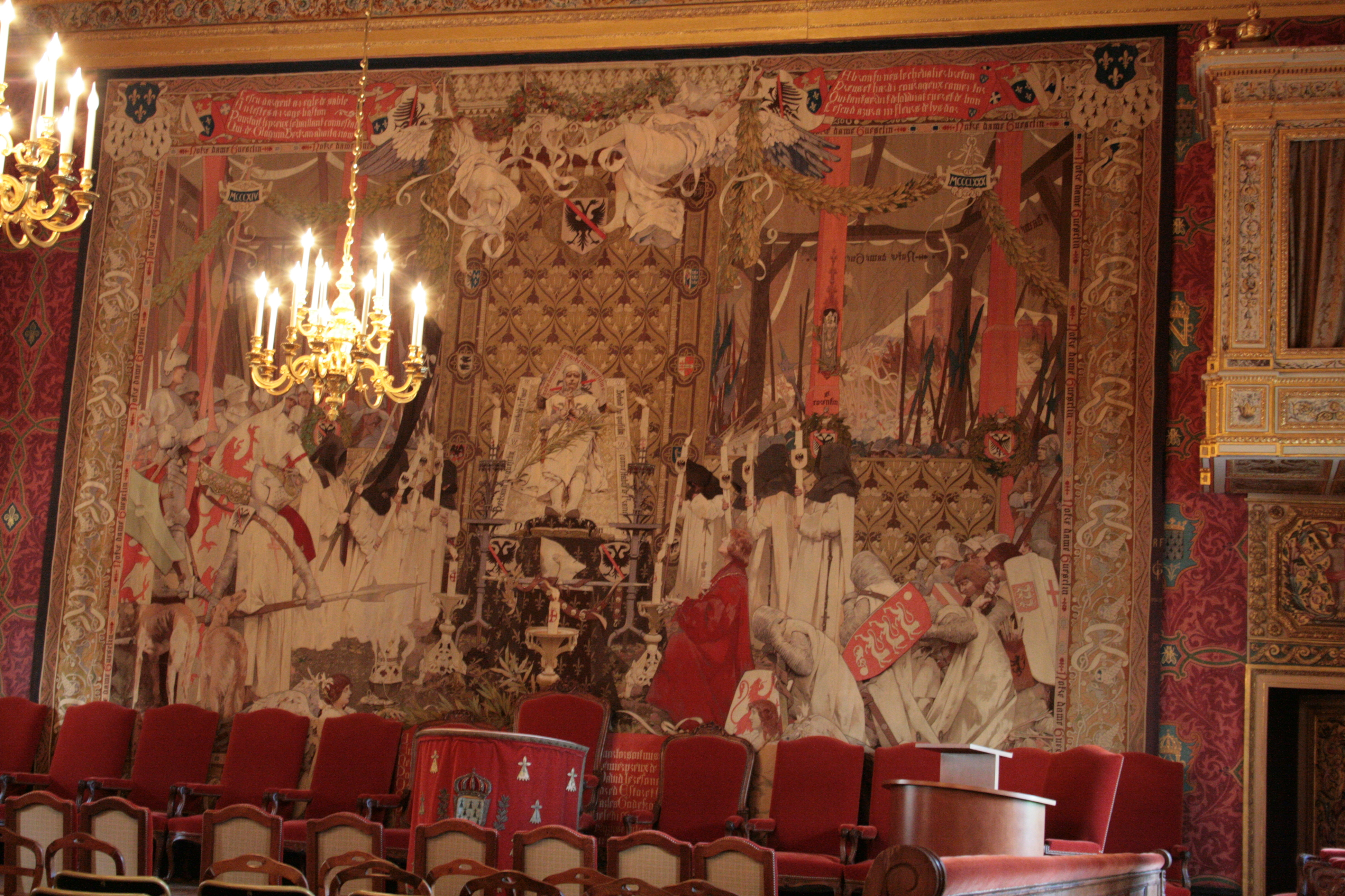 Parlement de Bretagne, Grand Chambre, La mort de Duguesclin, tapisserie des Gobelins